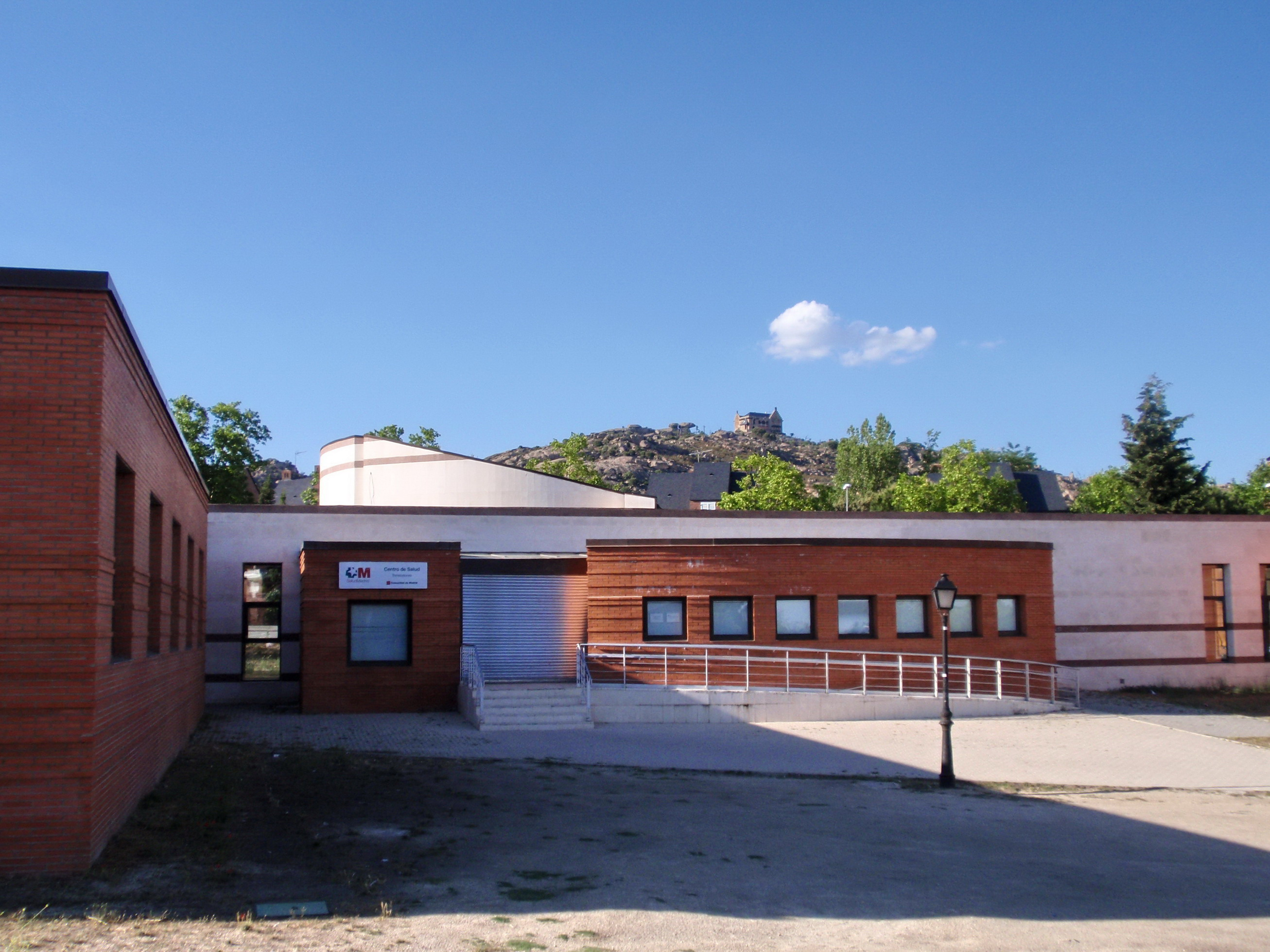 Torrelodones. Centro de Salud y Canto del Pico.